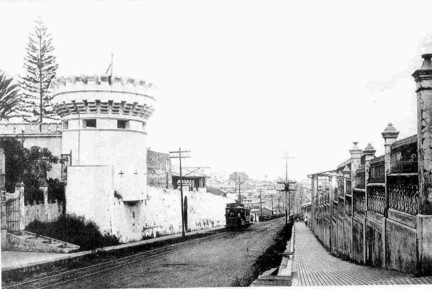 Cuartel Bellavista (hoy Museo Nacional), viendo hacia el Oeste de San José, en la llamada "Cuesta de Moras"